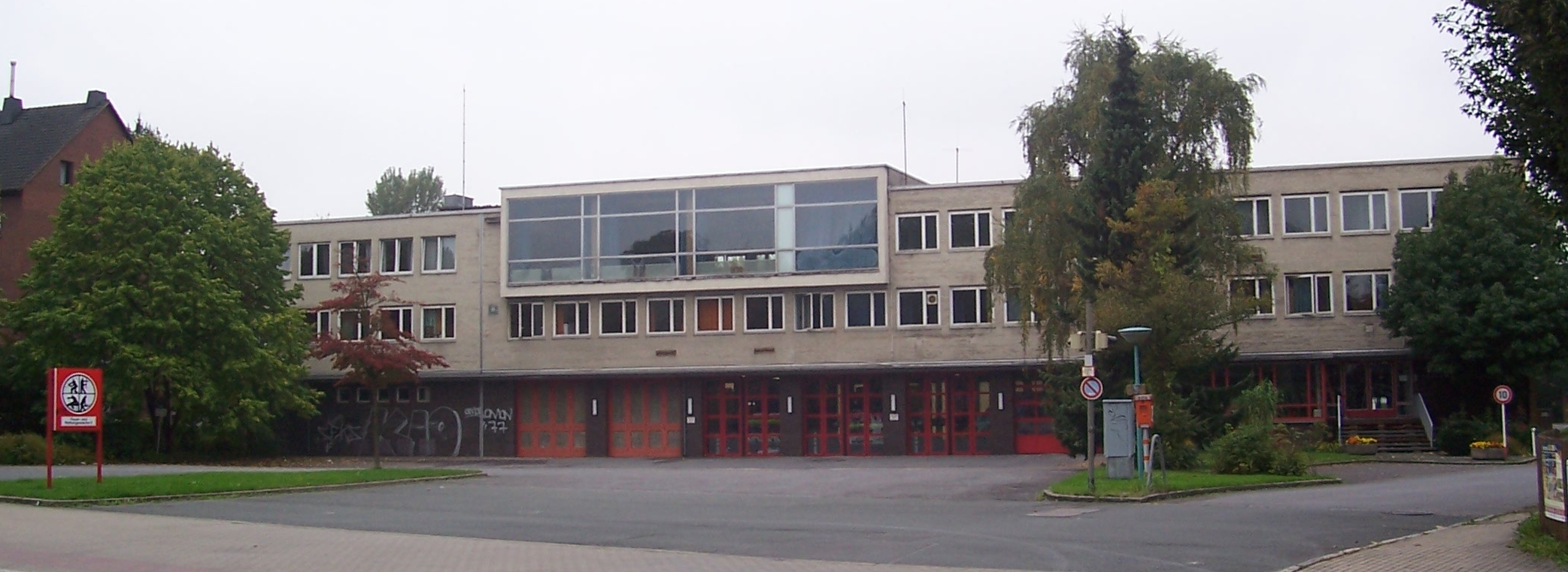 Feuer- und Rettungswache 4, Fire station 4 in Dortmund, Germany